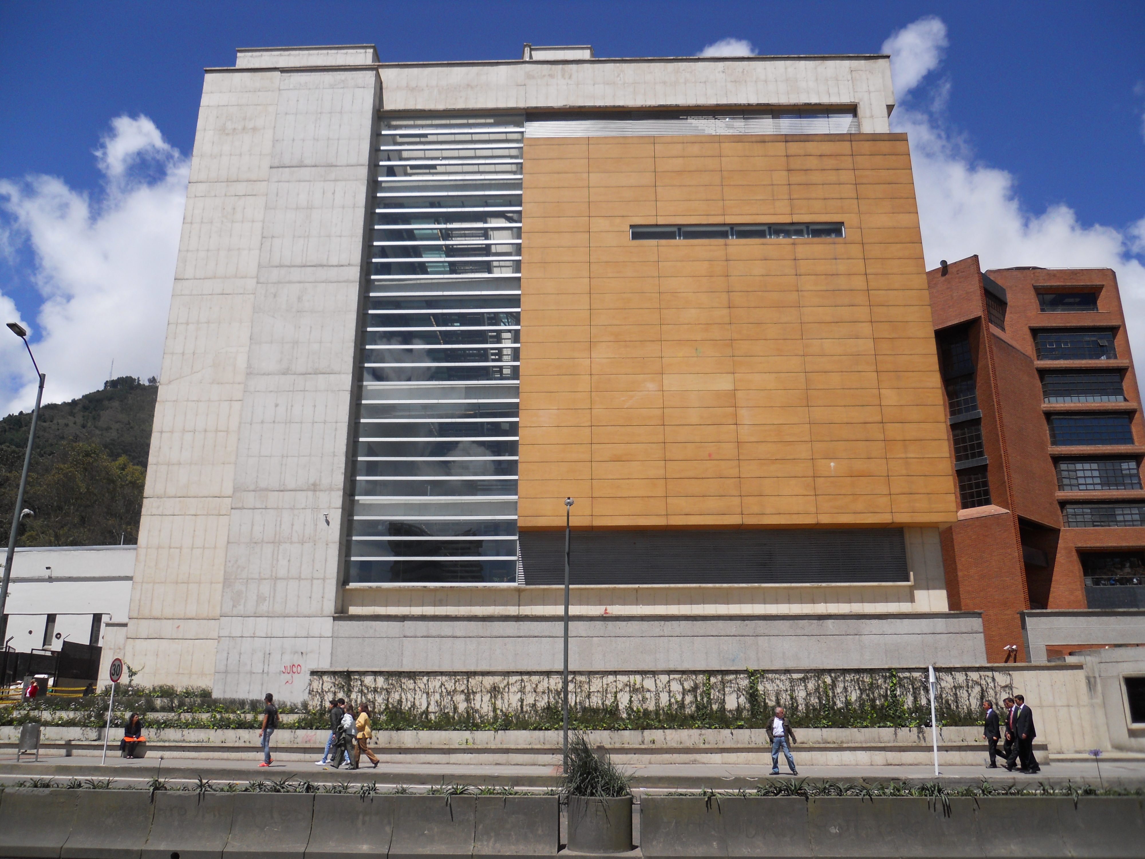 Universidad Javeriana, Centro Ático. Carrera 7 con calle 40.